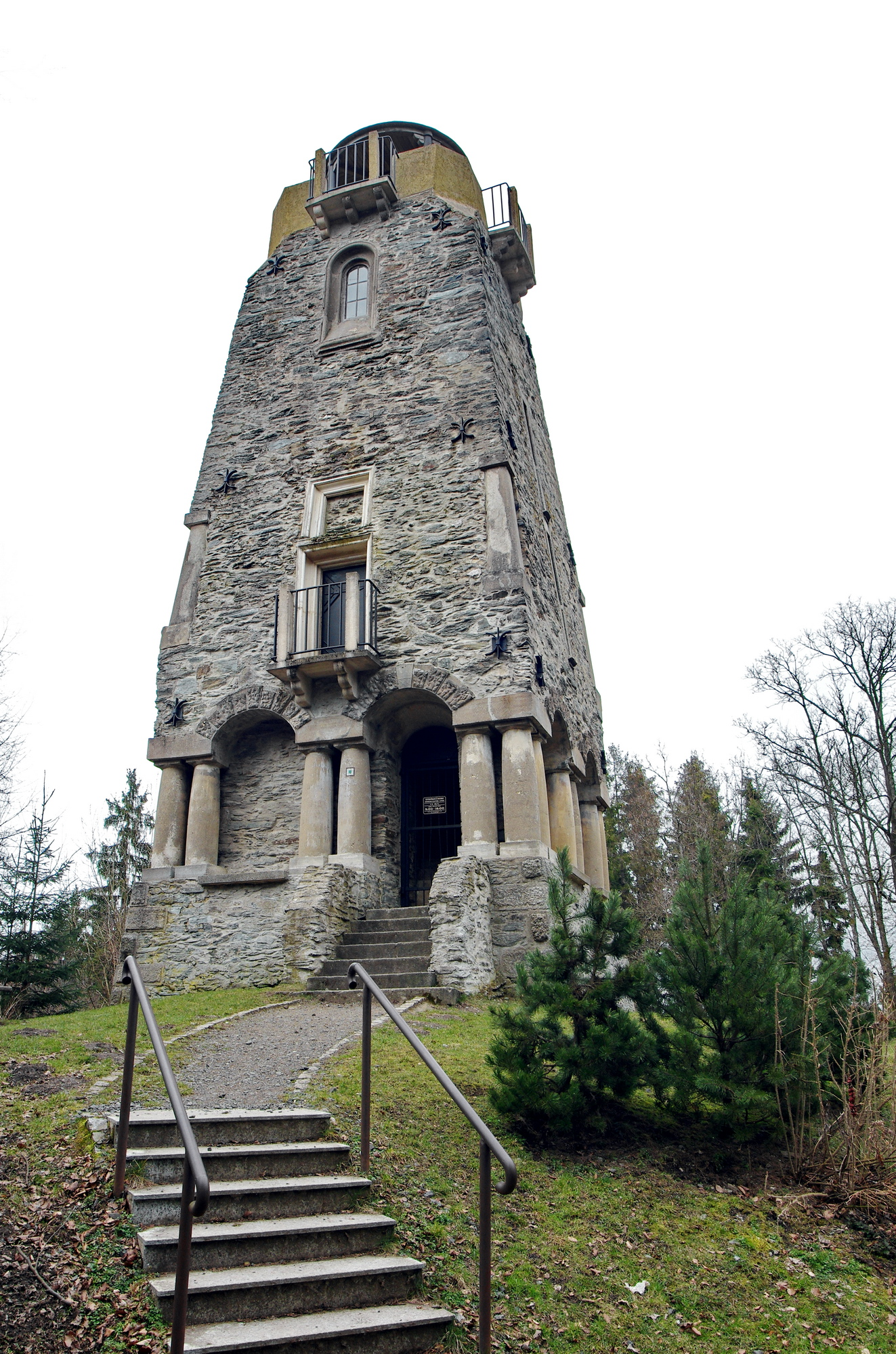 Bismarckova rozhledna na Zelené hoře (637 m), Horní Pelhřimov, osada Chebu